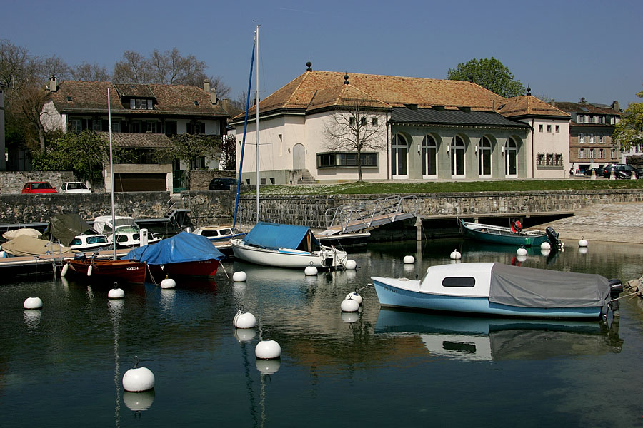 Bootshafen beim Place des Ormes in Coppet